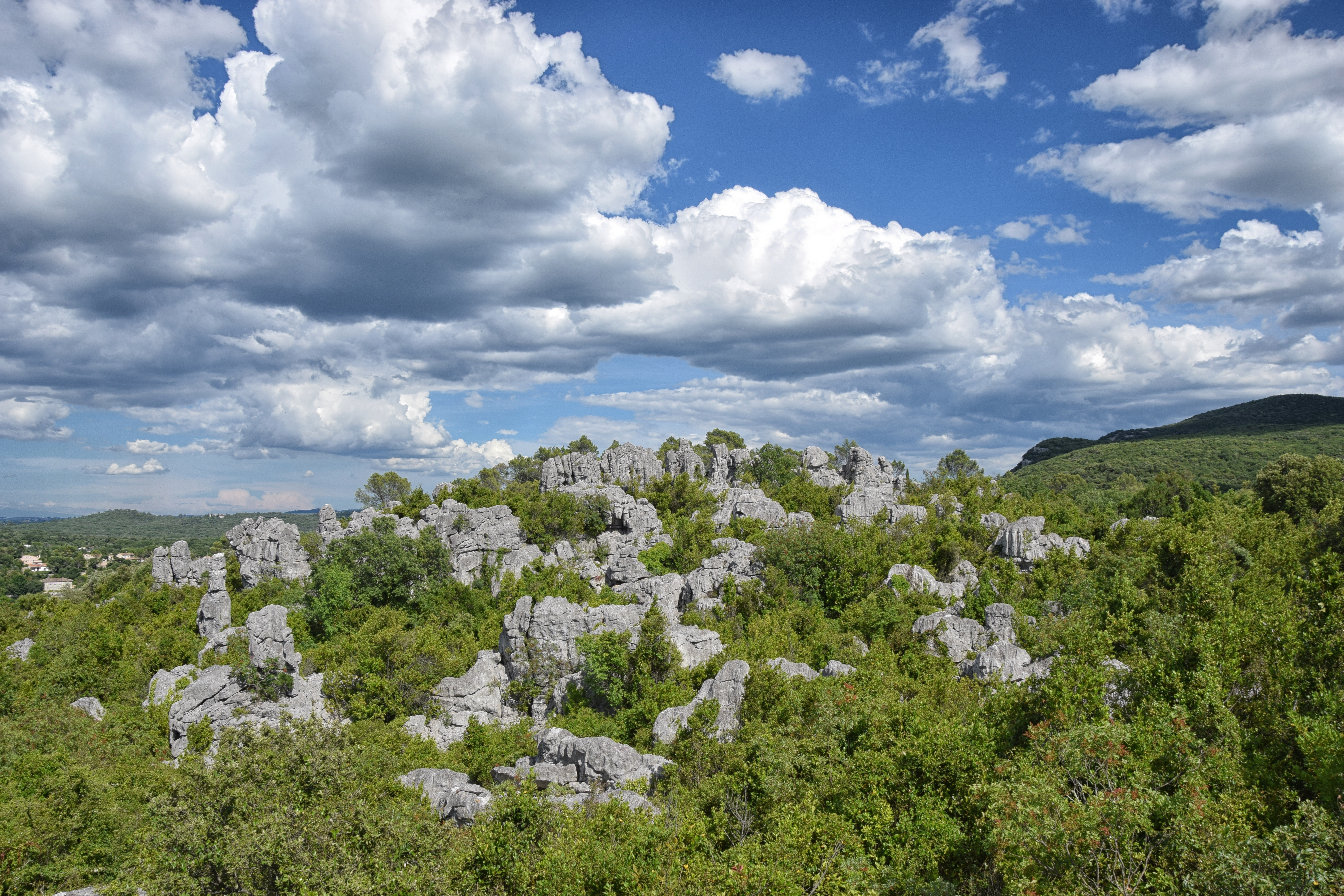 La Mer des Rochers (Sauve - Gard - Occitanie)